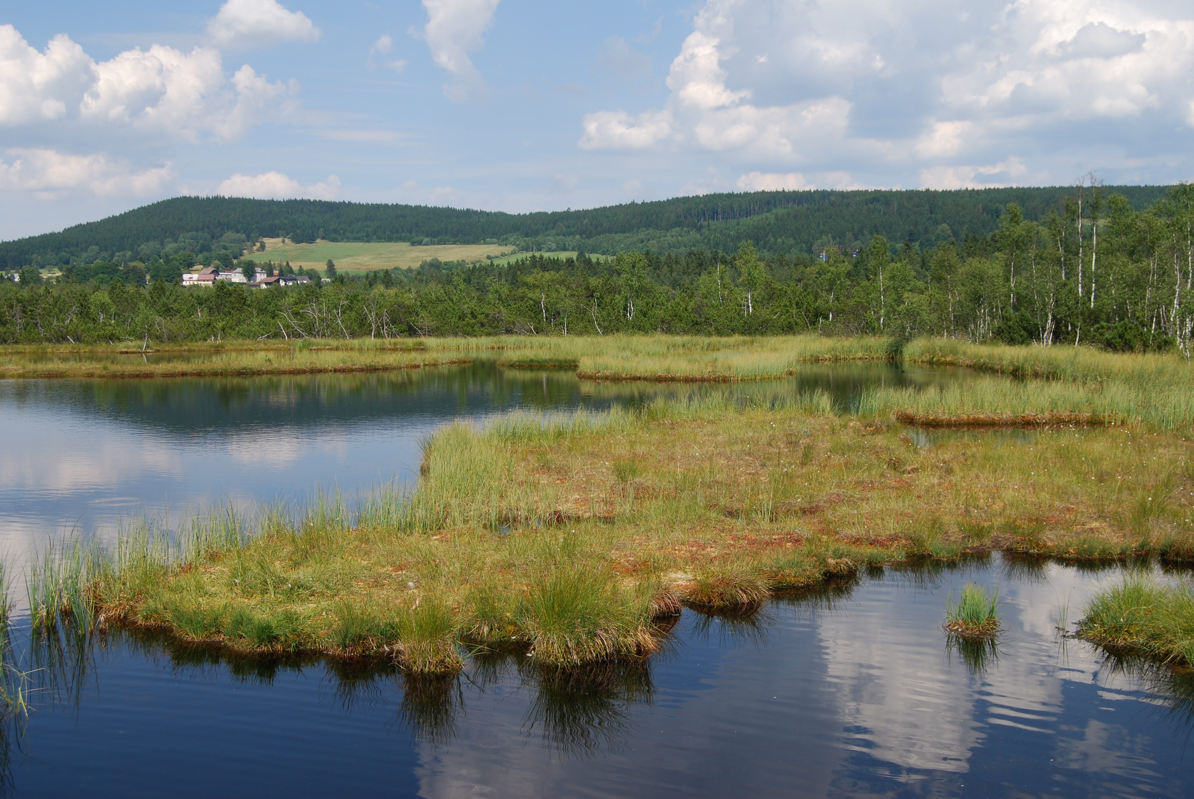 Kruhové jezírko s ostrůvky. Chalupská slať je rašeliniště v katastrálním území Svinná Lada, zhruba 1 km severně od Borových Lad. Česká republika.